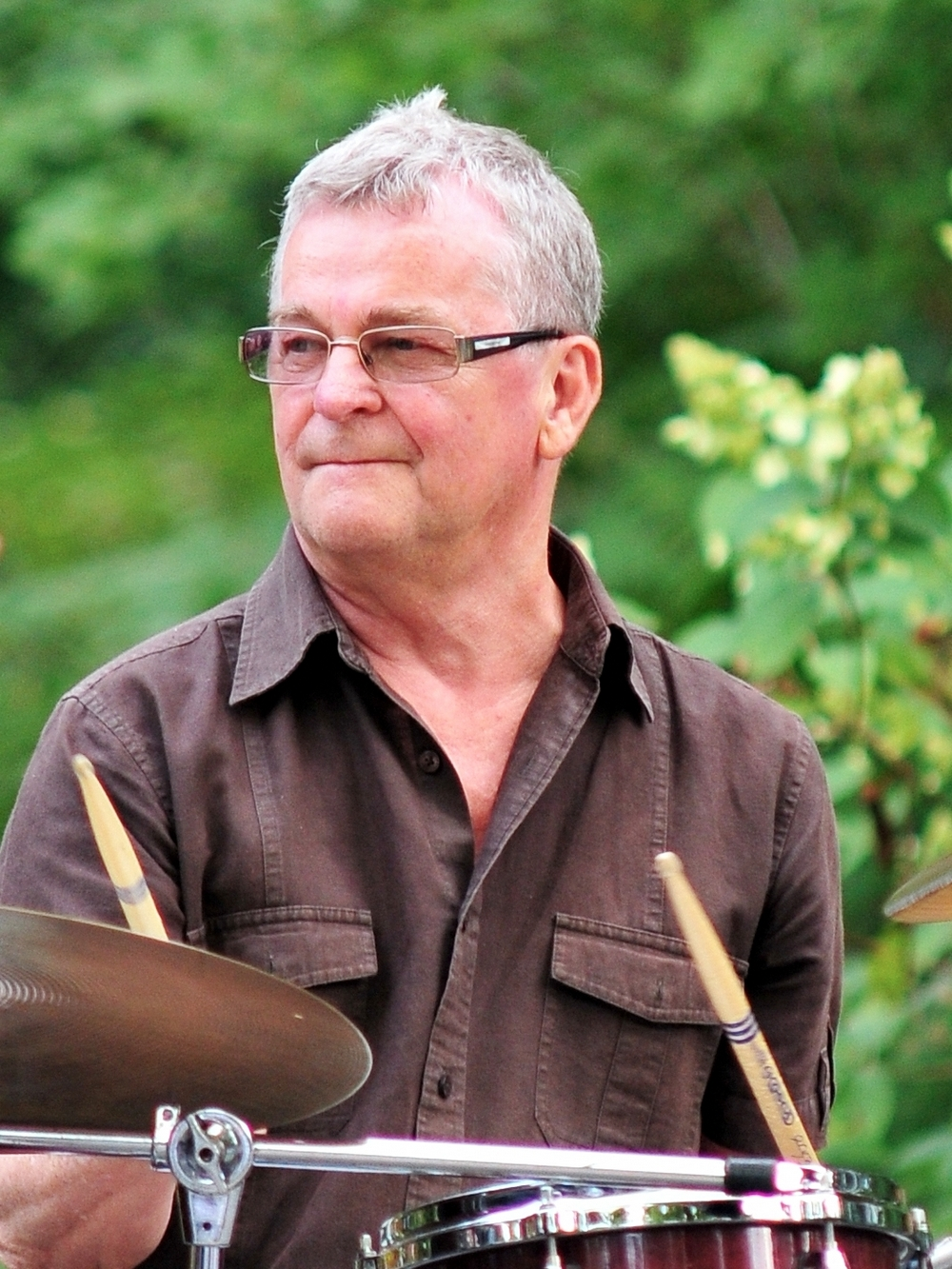 Czesław Bartkowski, Park Dreszera, Warszawa 2013.